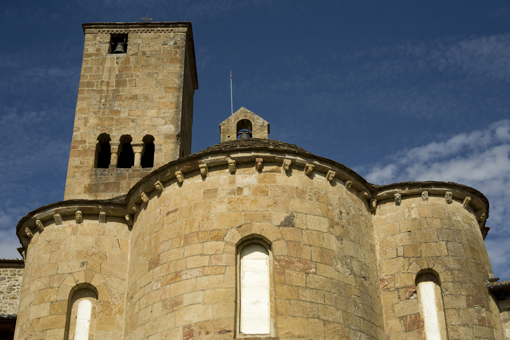 unidentified Spain